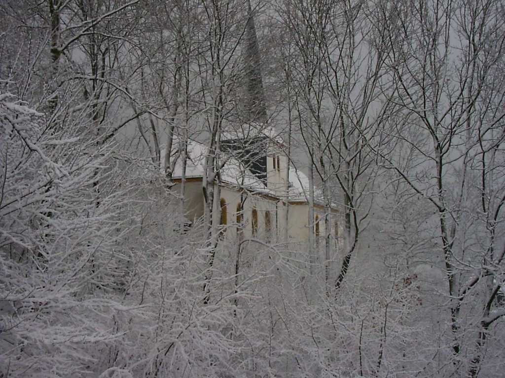 Die Pfarrkirche Rödgen von Süd-Osten.